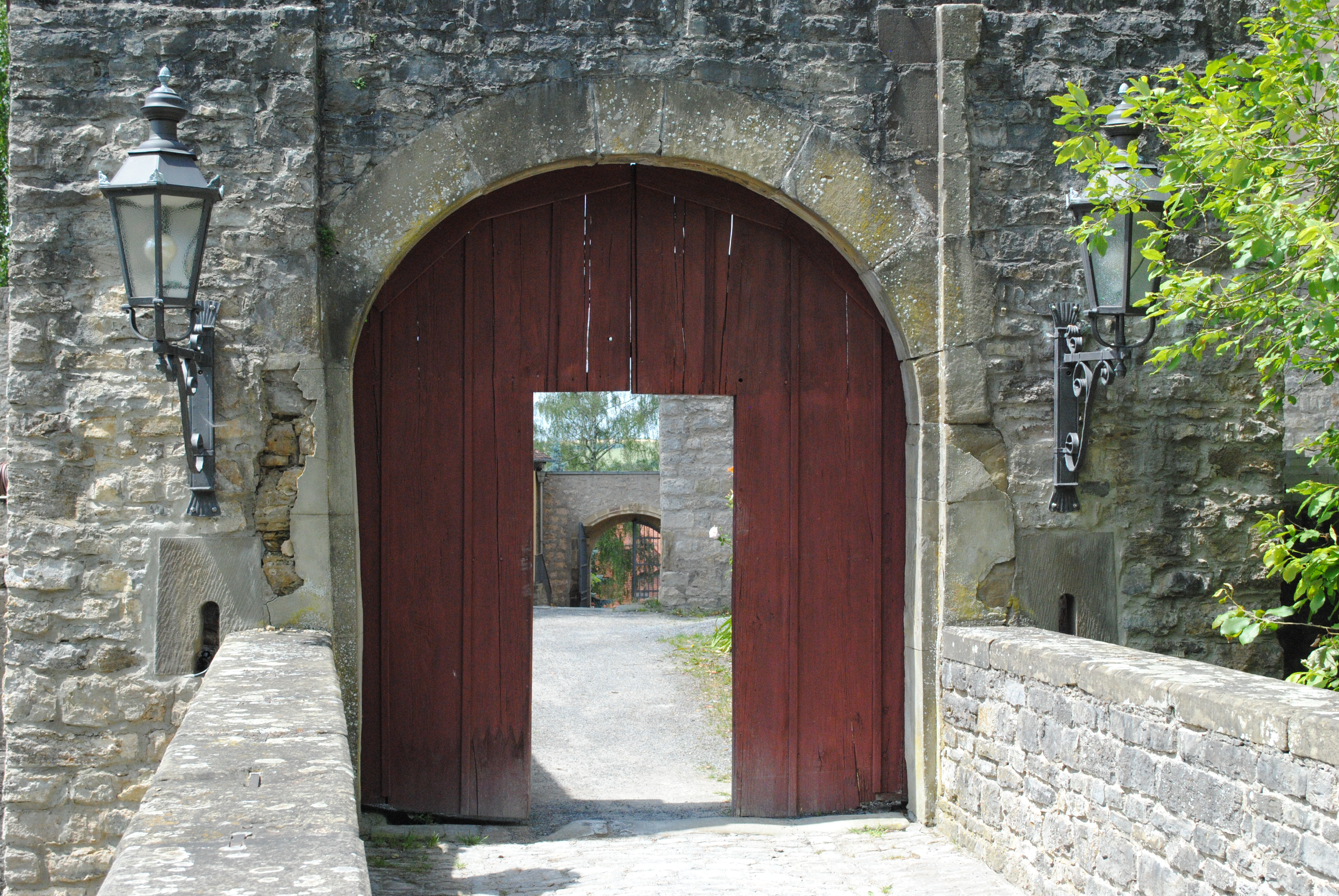 Brücke mit Tor auf Burg Arnstein (Main-Spessart)